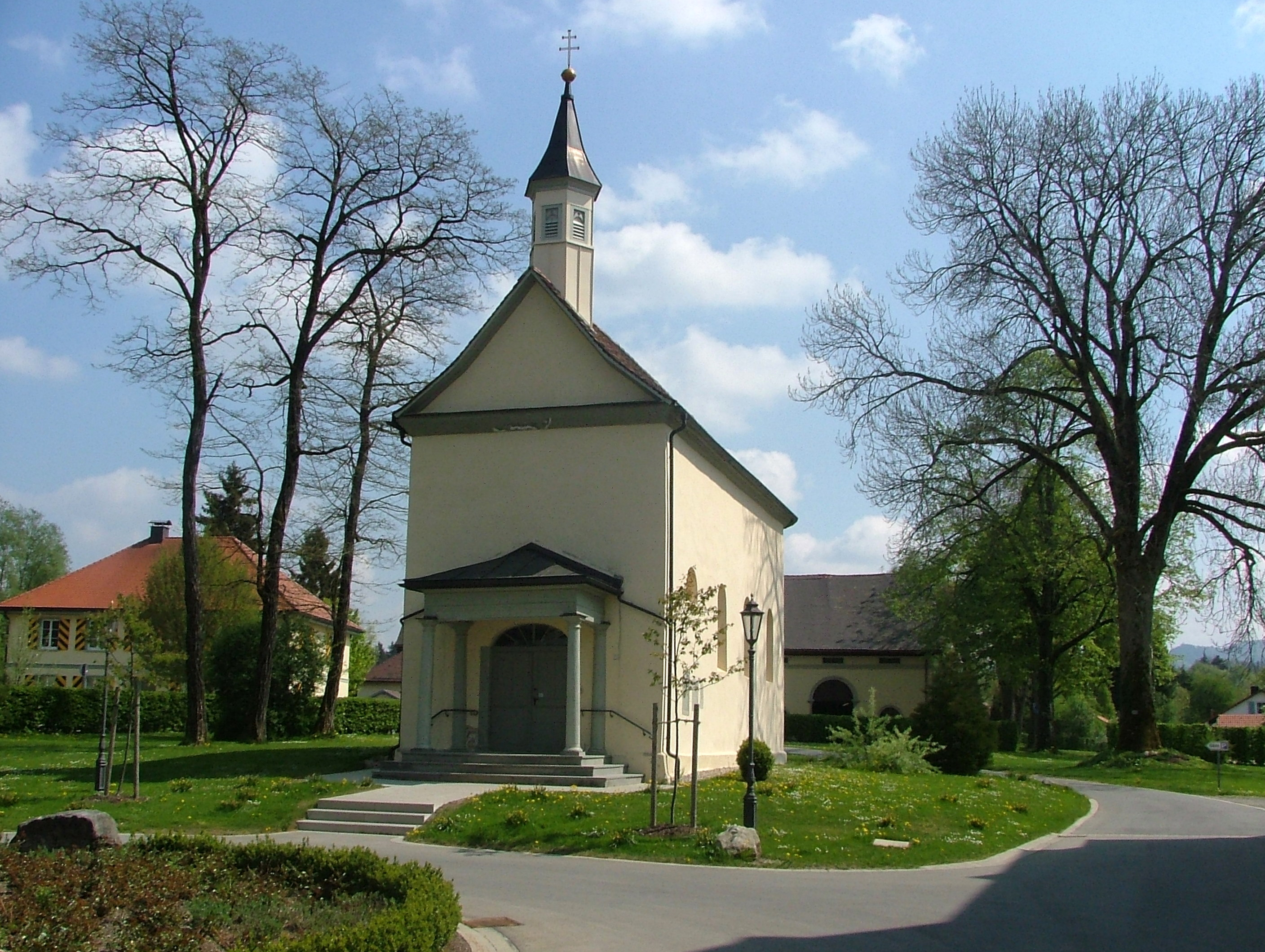 Schlosskirche Neutrauchburg